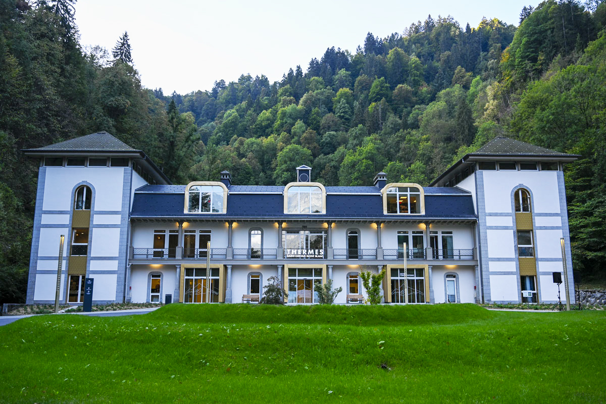 Les Thermes de Saint-Gervais après la rénovation de 2018